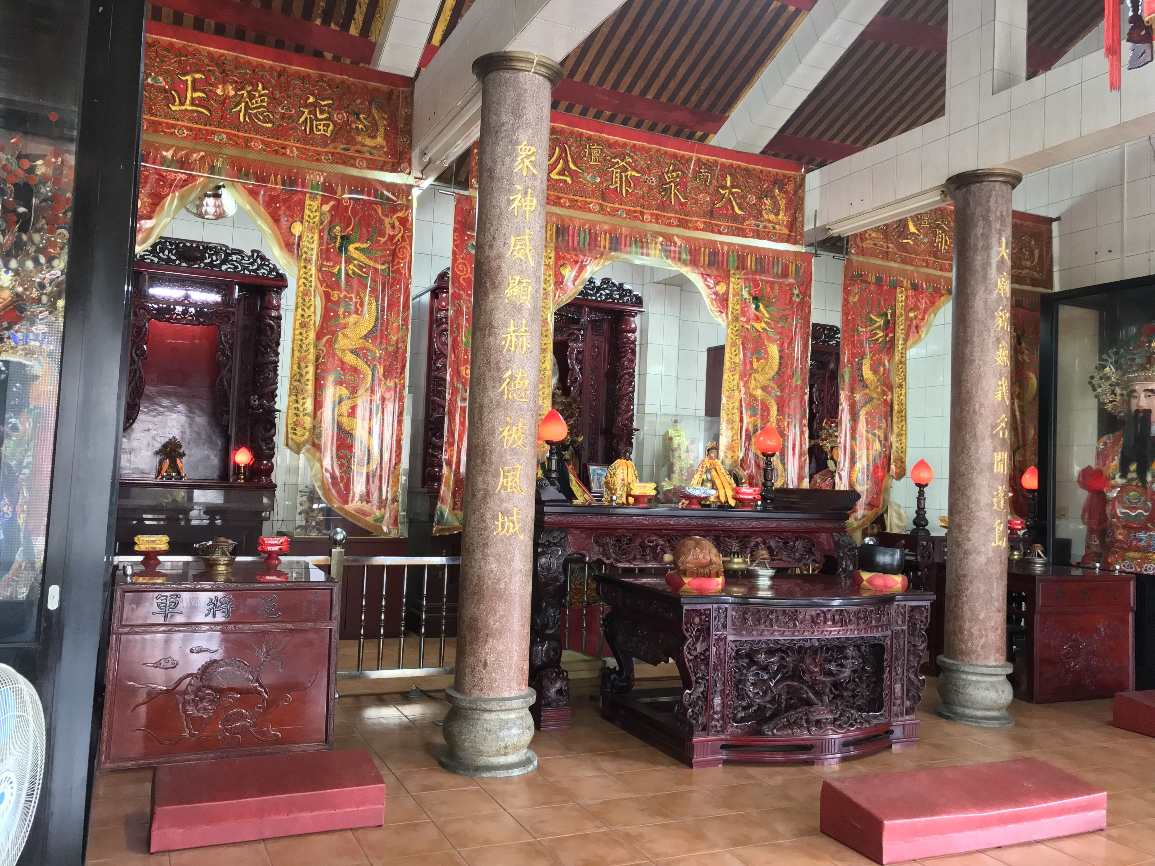 南壇大眾廟二樓殿內